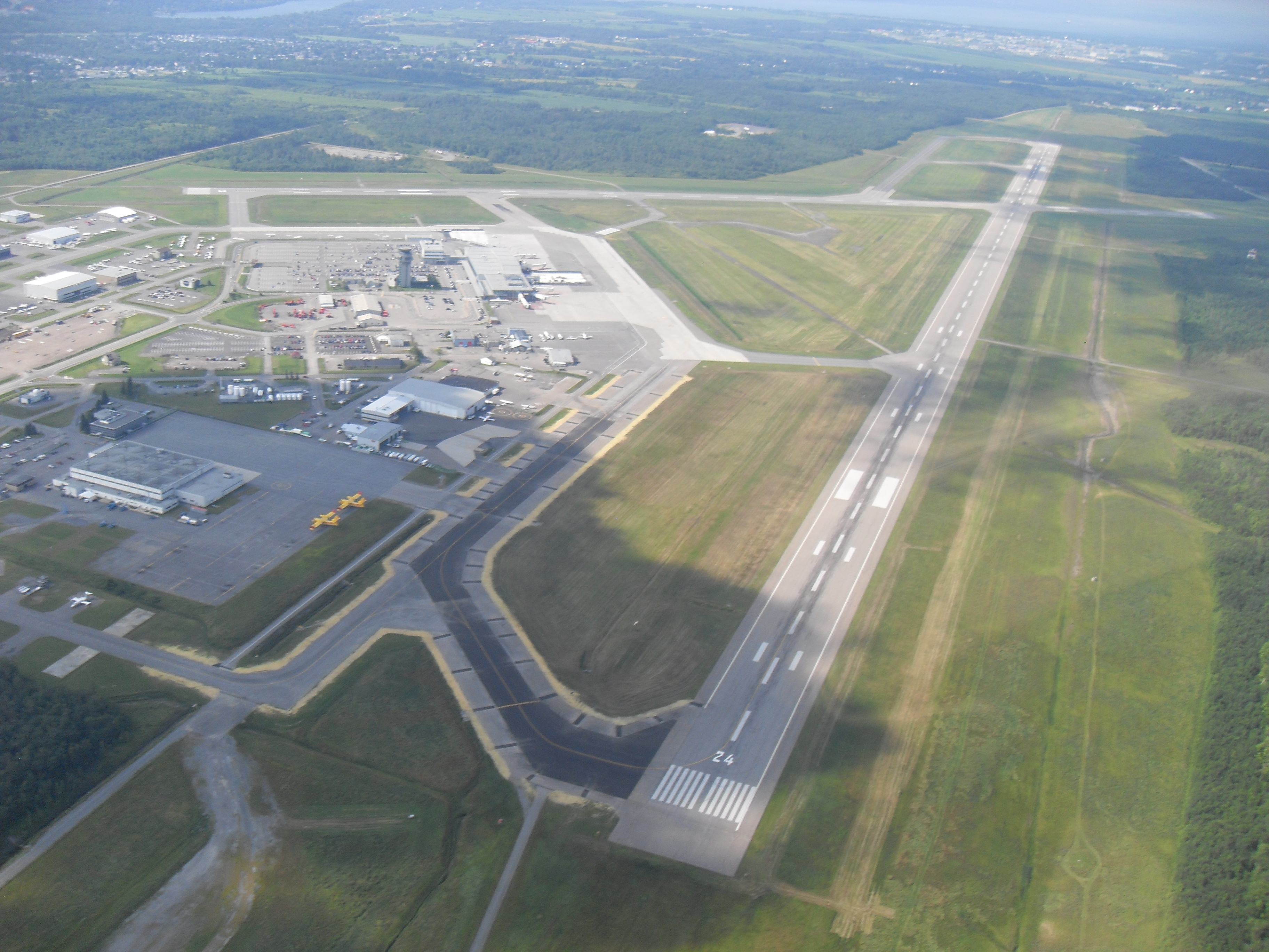 Vue aérienne de l'aéroport de Québec, Qc, Canada